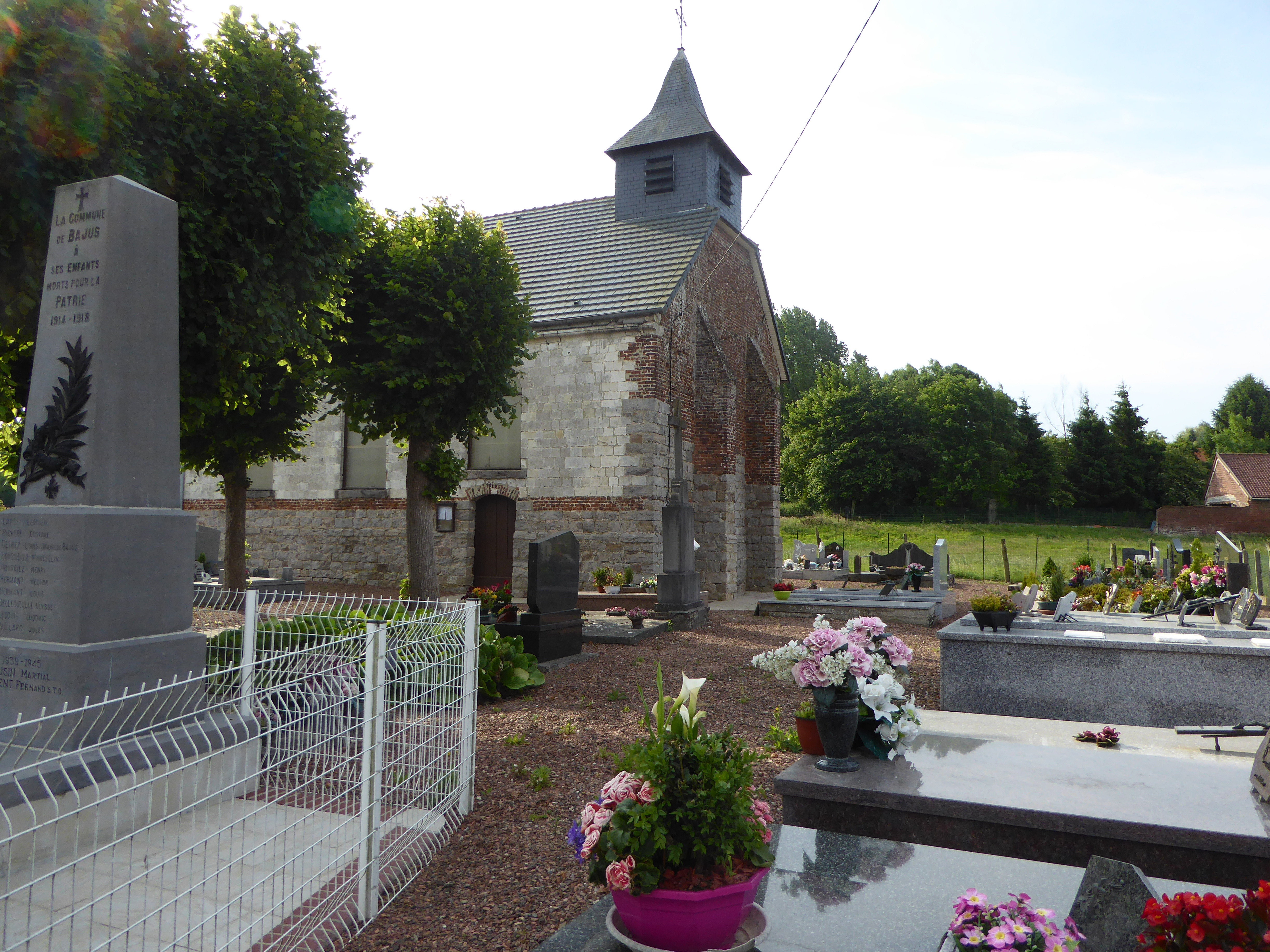 Église Saint-Vaast de Bajus (Pas-de-Calais, France) .